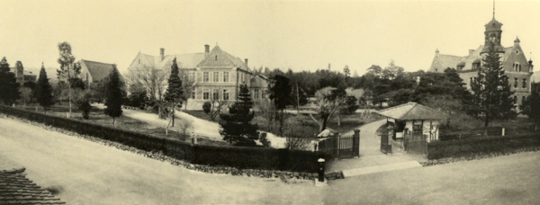 大正初期の今出川キャンパス